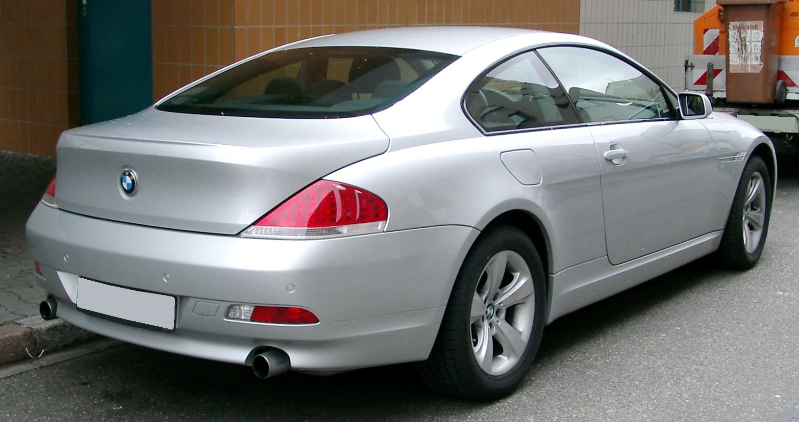 BMW E63